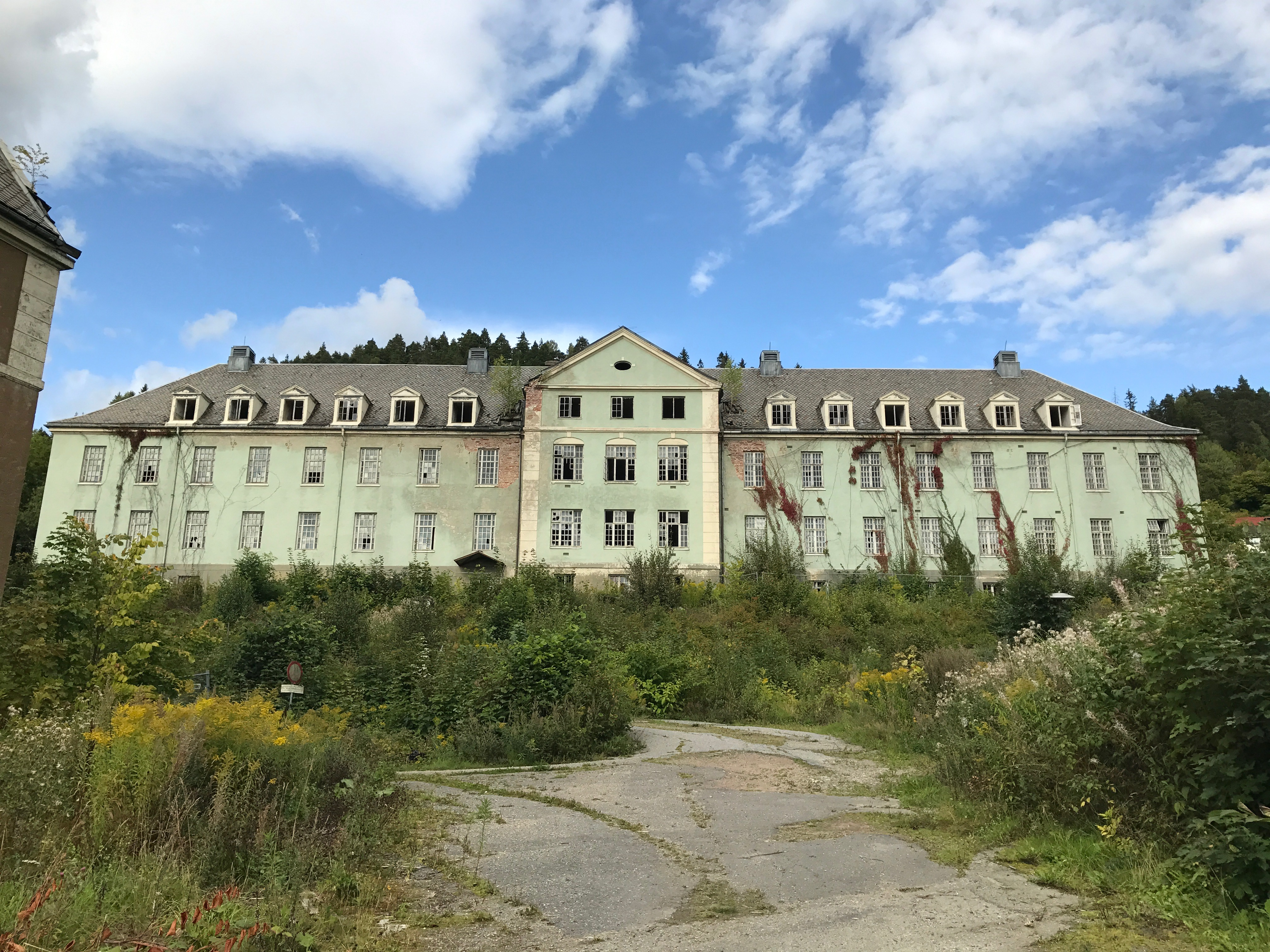 Bilde av B bygget på Lier sykehus fra September 2017